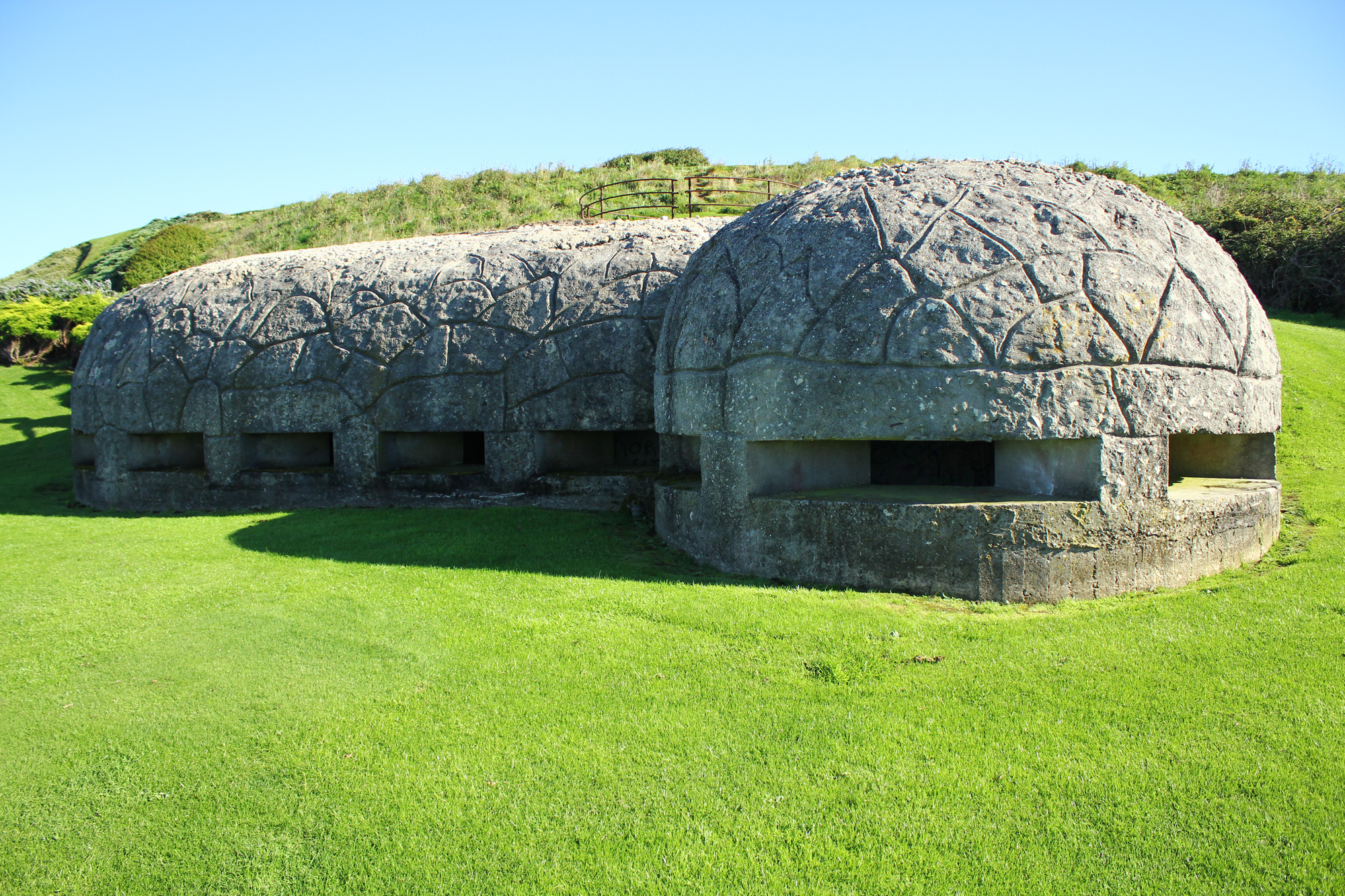 Batería de artillería de costa del Monte de San Pedro, en La Coruña (Galicia, España). Battery of Mount San Pedro Coastal artillery battery of Mount San Pedro, in La Coruña (Galicia, Spain).